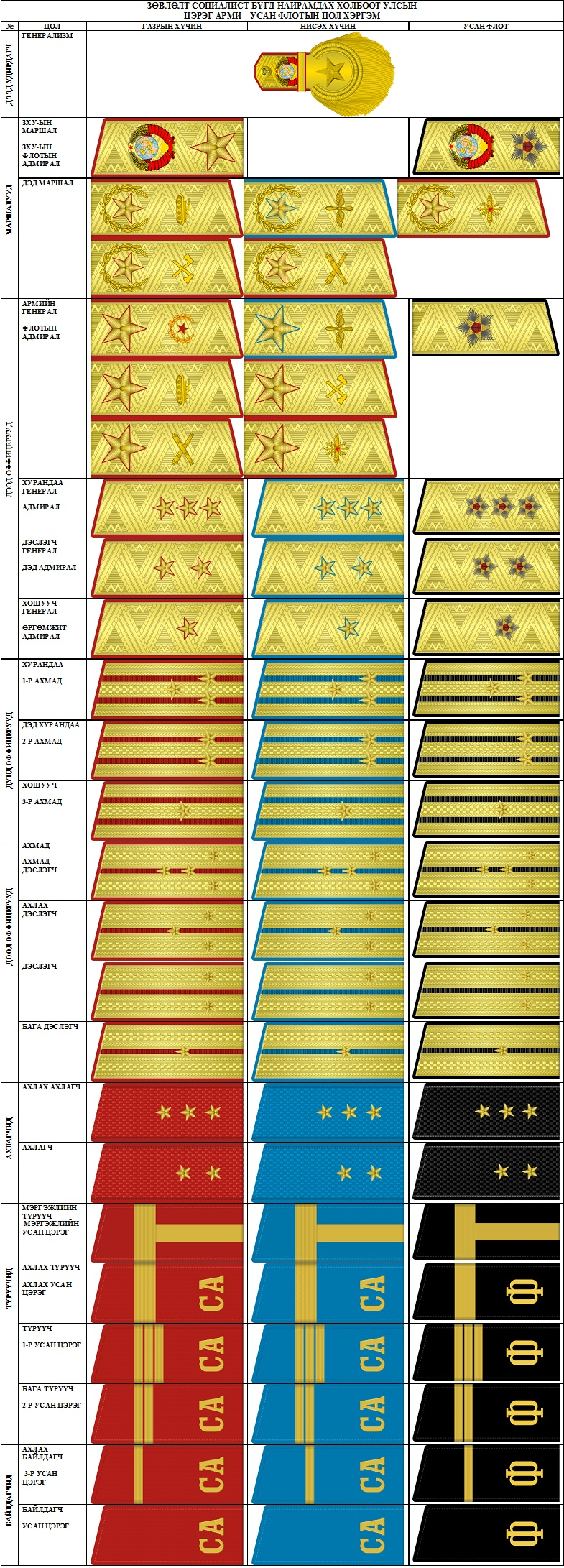 Монгол: ЗХУ-ын цэргийн цол